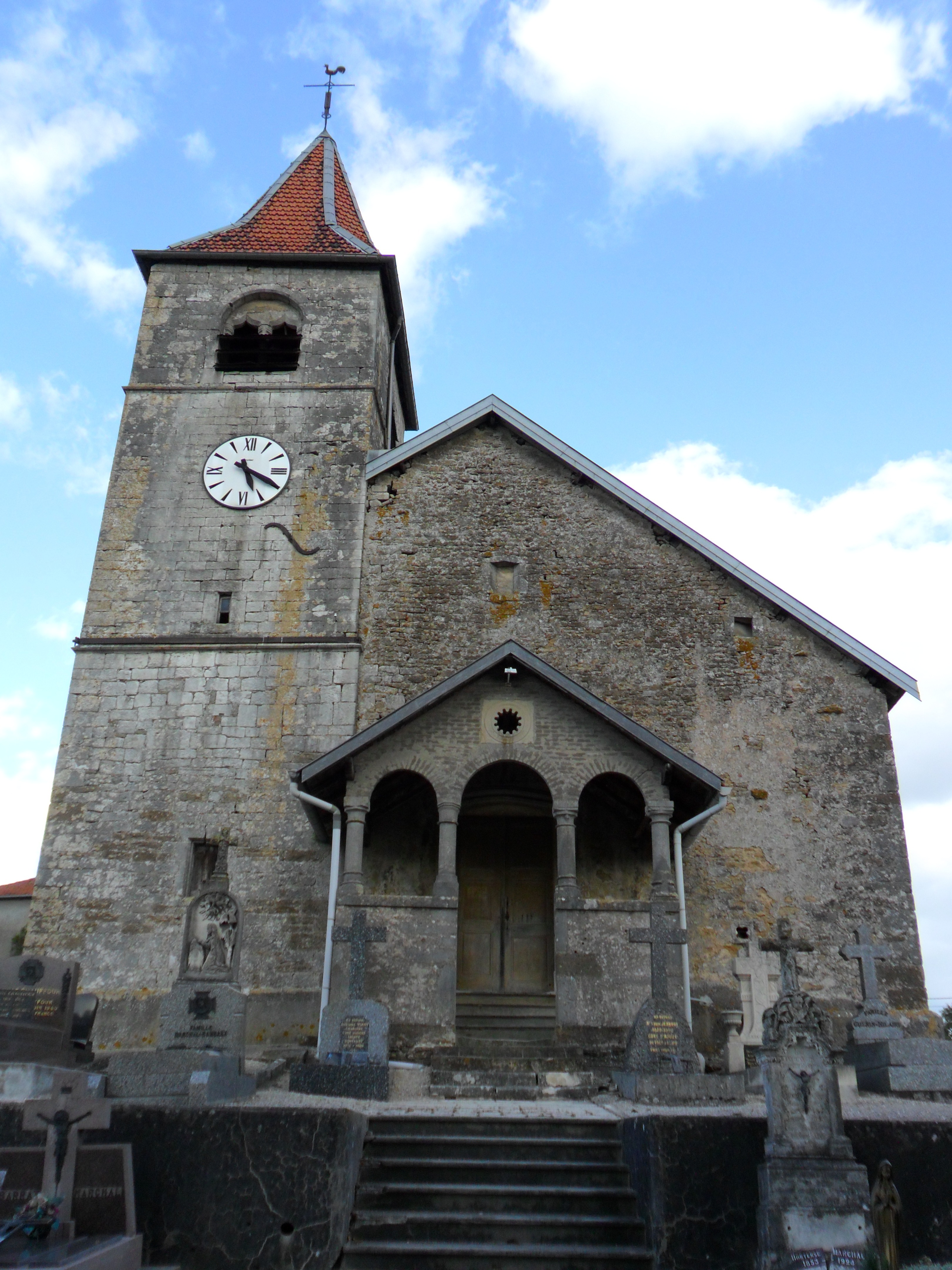 Eglise Saint-Vincent d'Aouze .